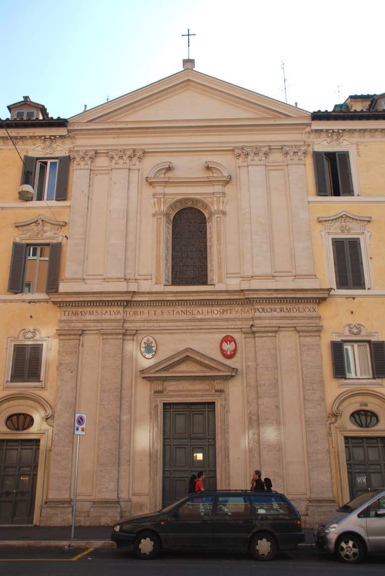 Kościół św. Stanisława w Rzymie (Chiesa di Stanislao, via delle Botteghe Oscure)